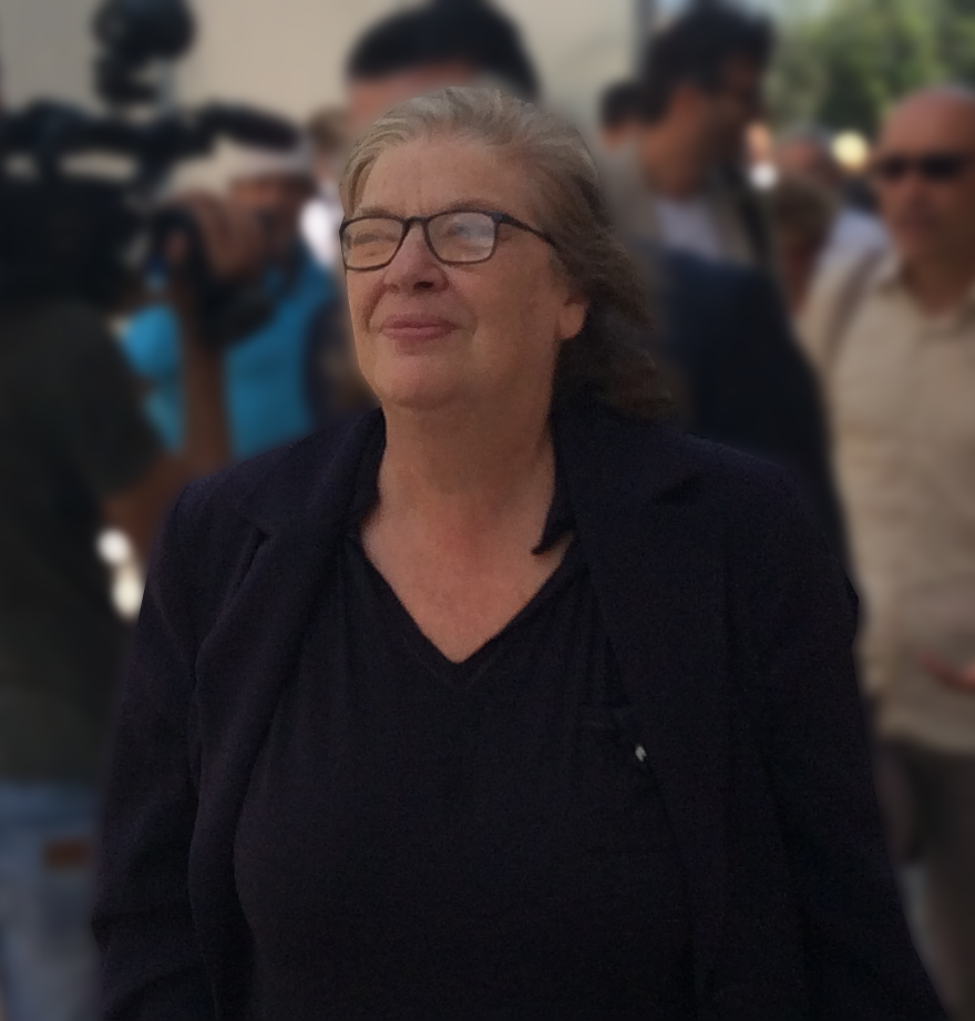 Elena Gentile è una politica e attivista italiana, parlamentare europeo del Partito Democratico.